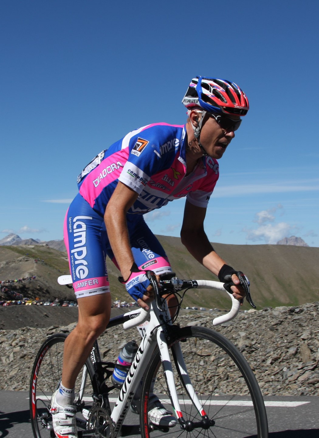 7493 cunego